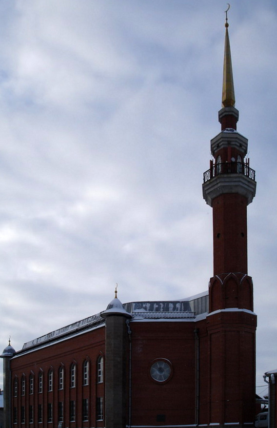 Мечеть в г. Ижевск, Удмуртия, Россия